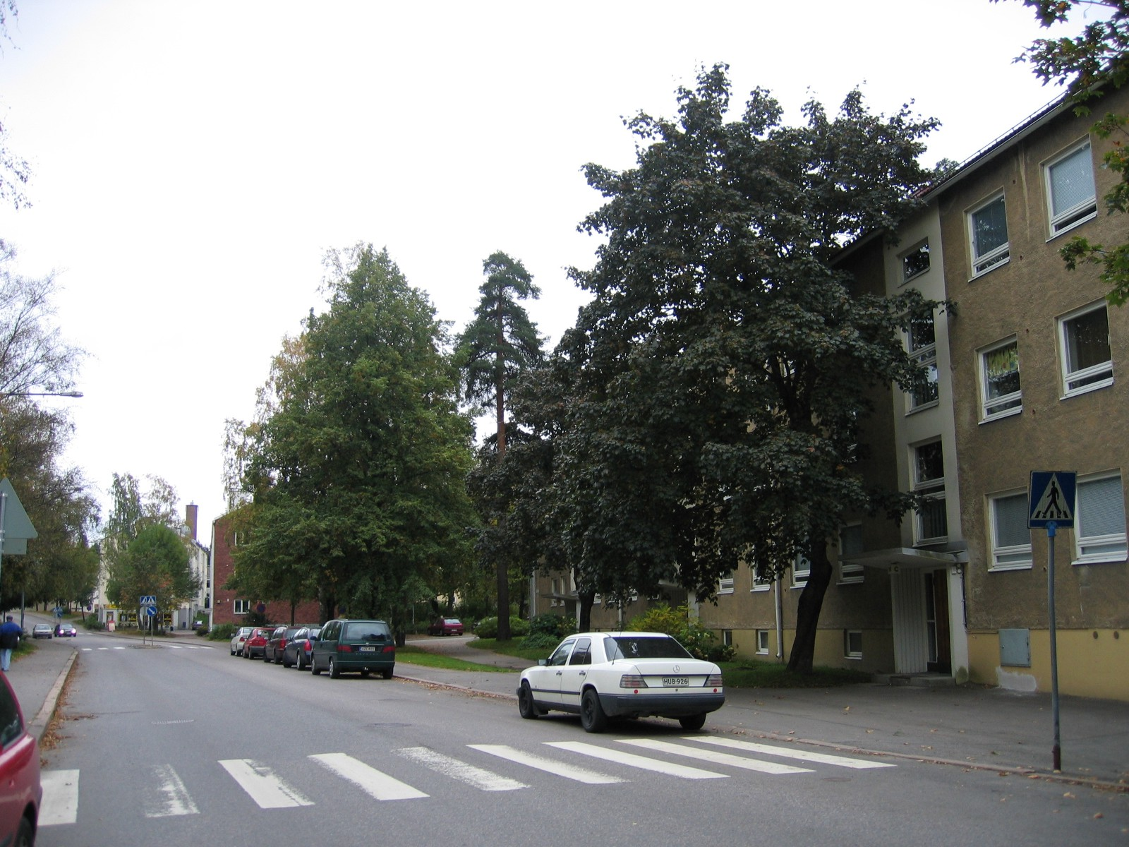 Maunula/Månsas in Helsinki, Finland